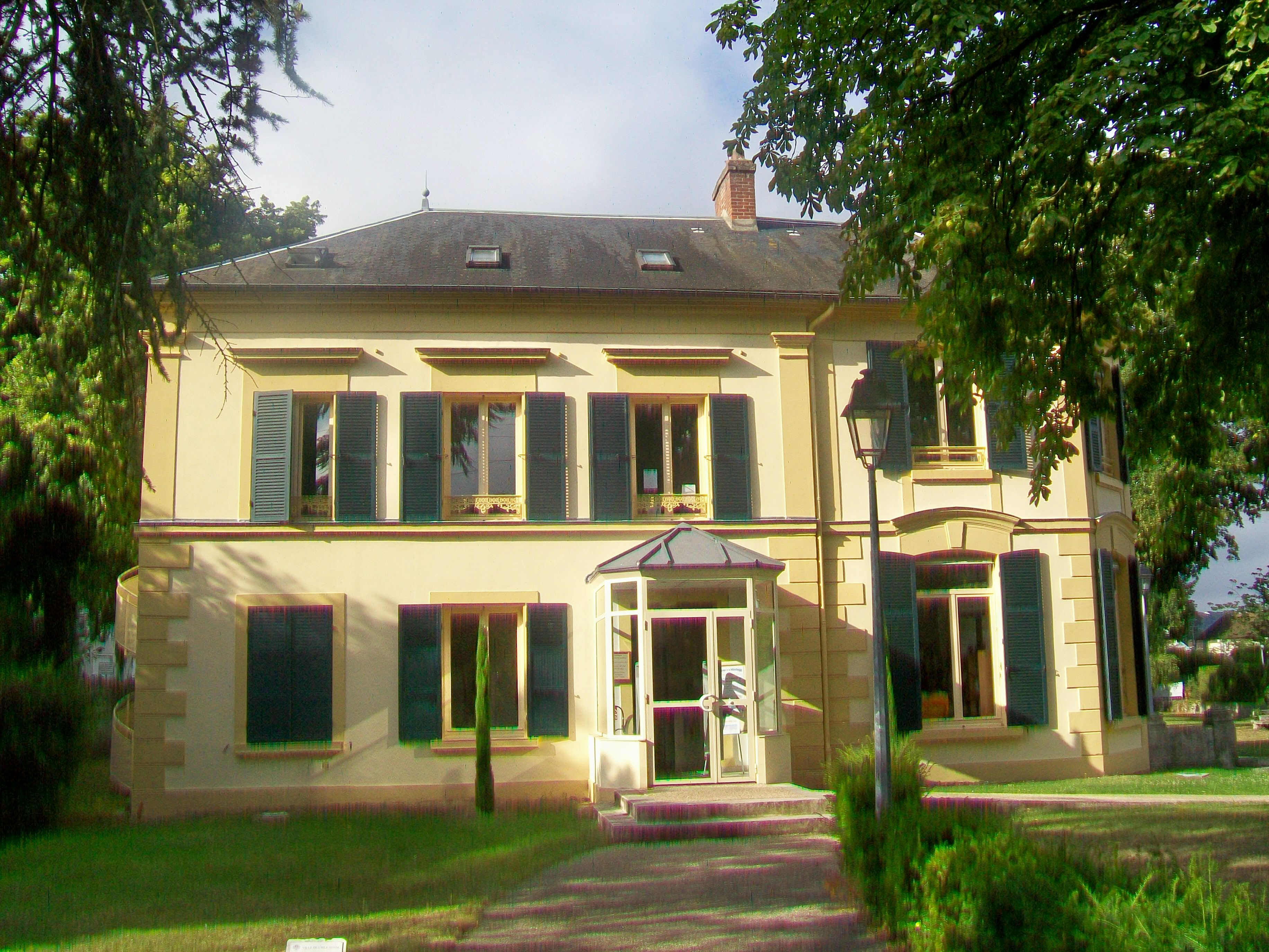 Bibliothèque municipale Georges-Duhamel, 44 avenue de Paris.